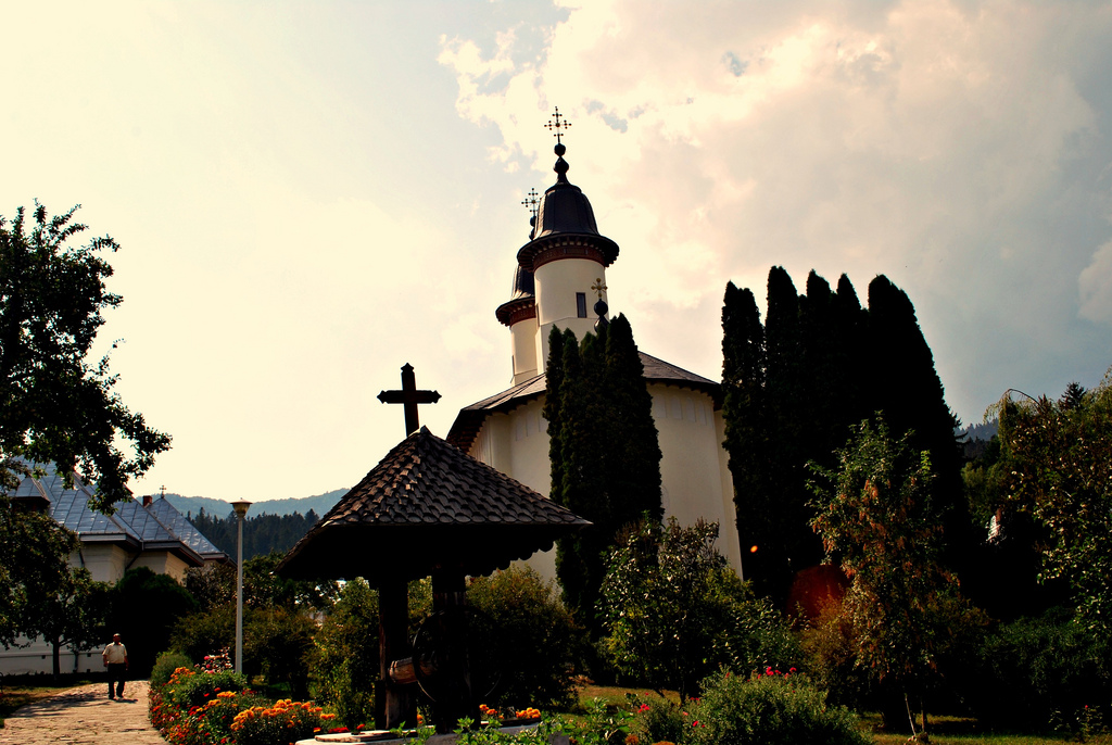 Mănăstirea Văratic